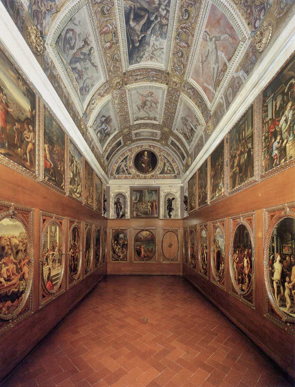 Vista del Studiolo de Francisco I, Palazzo Vecchio de Florencia